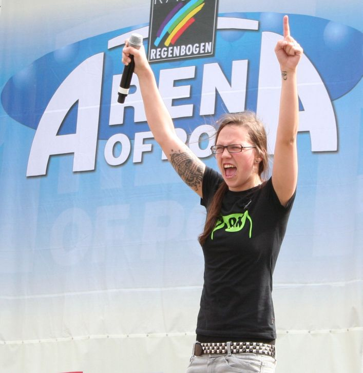 Sängerin Stefanie Heinzmann bei Arena of Pop von Radio Regenbogen im Mannheimer Ehrenhof